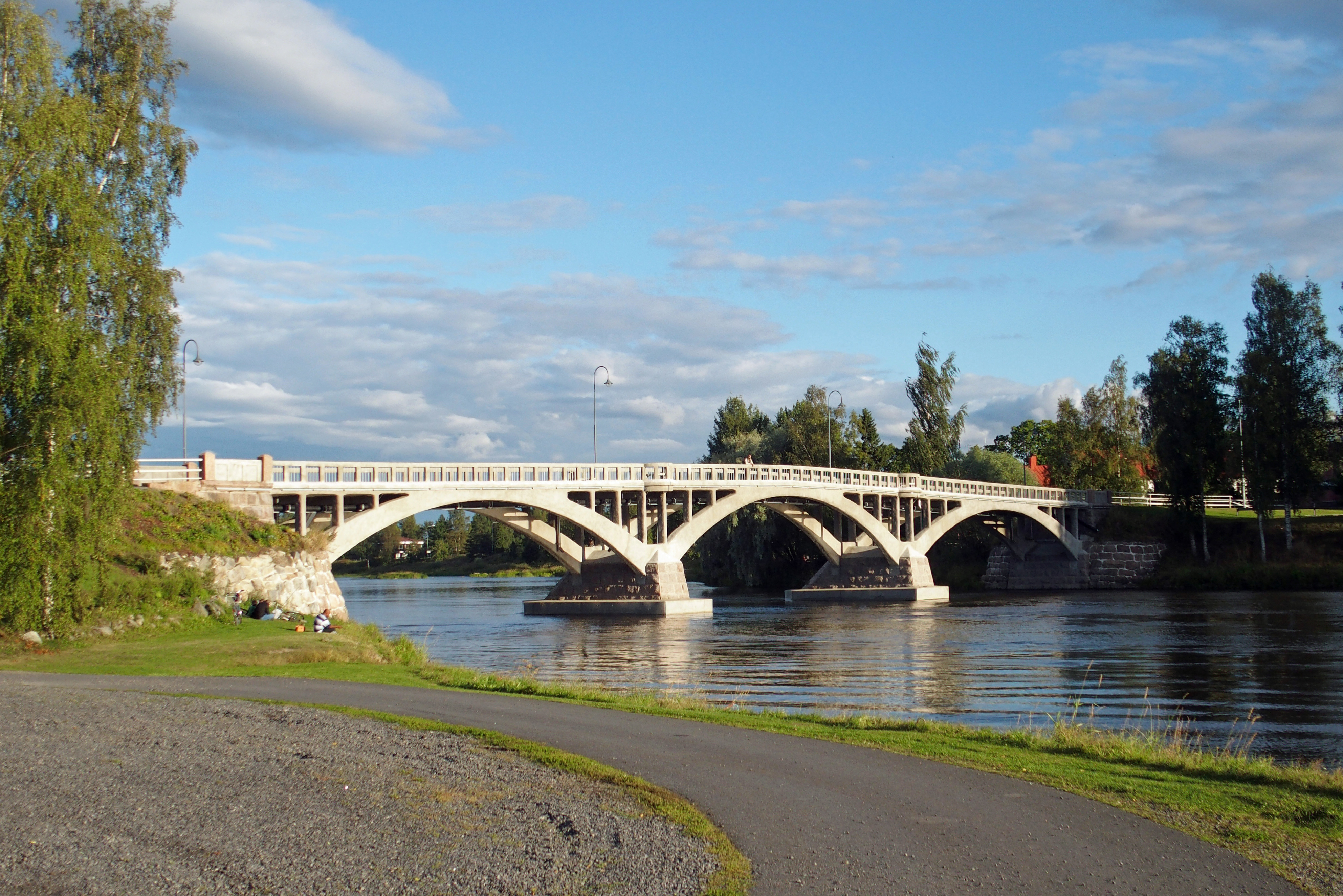 Tulkkilan vanha silta peruskorjauksen jälkeen 2016